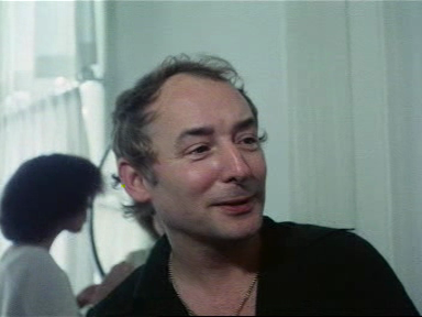 Modeontwerper Frank Govers.